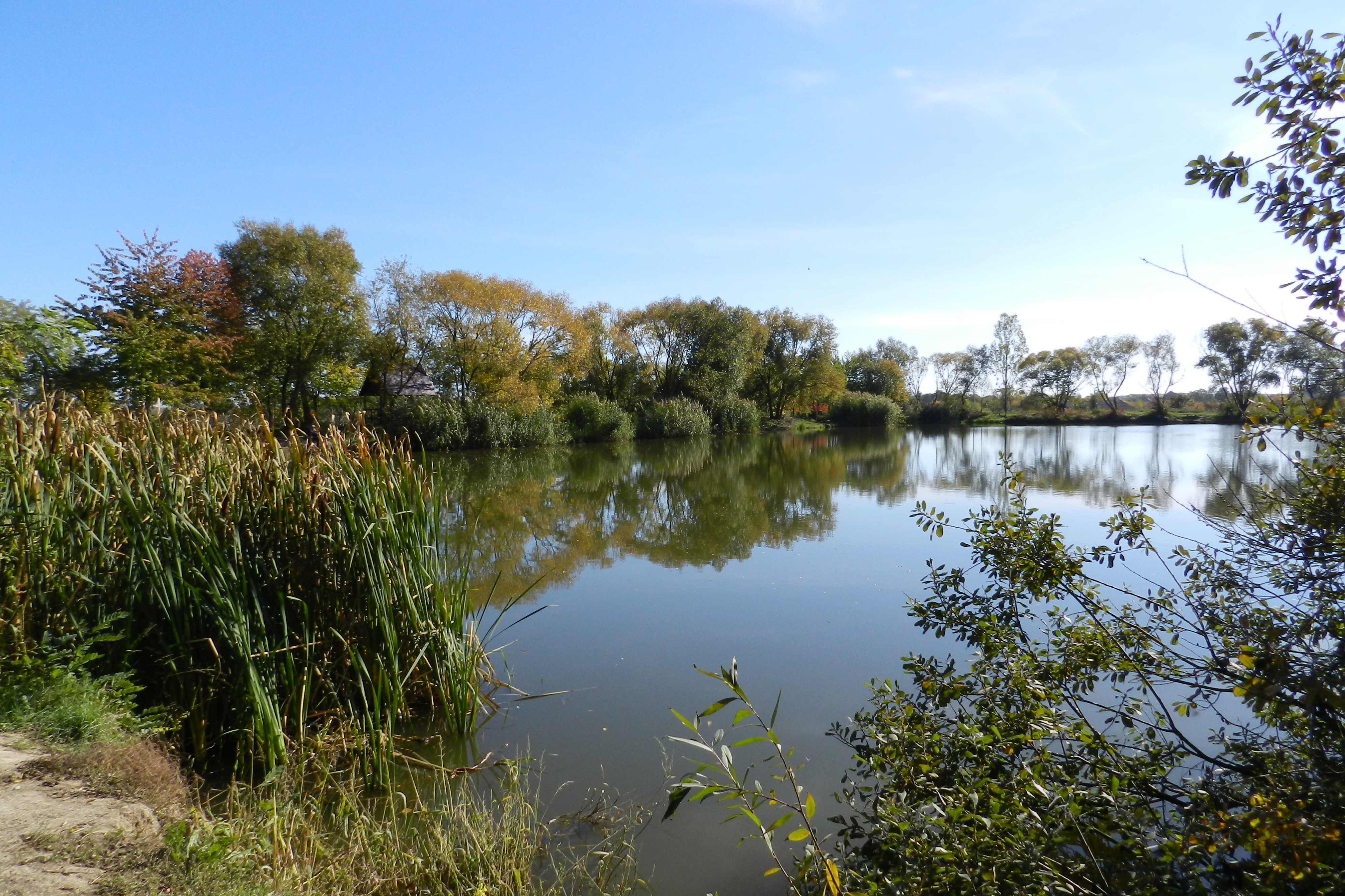 Озеро між селами Мала та Велика Бийгань